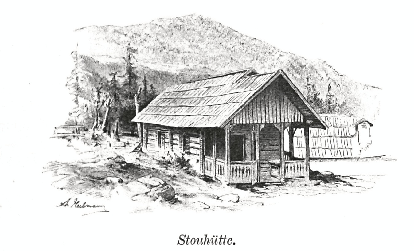 Stouhütte aus Zeitschrift des Deutschen und Oesterreichischen Alpenvereins 1894 Band 25